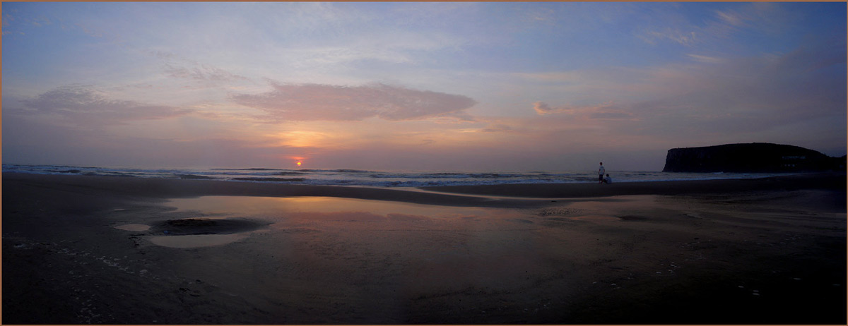 "La Bella Compagnia". Foto de um amanhecer em Torres, na Praia da Cal, 2010